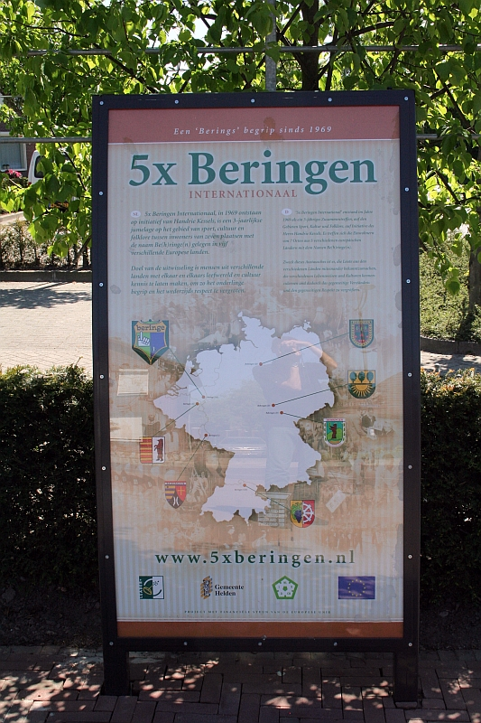 '5 maal Beringen' sign in Beringe, Limburg, The Netherlands